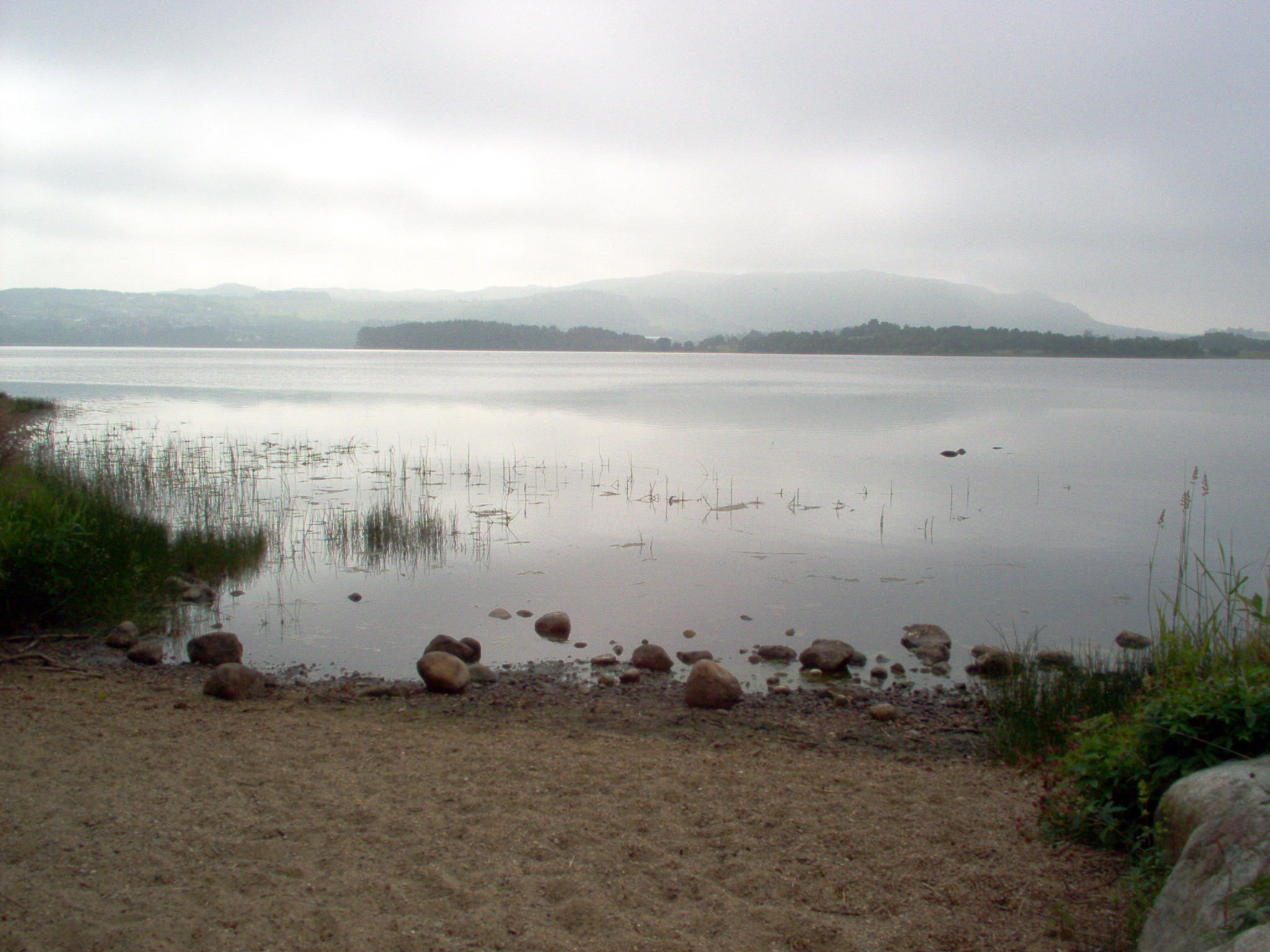 Frøylandsvatnet på Jæren, Rogaland, Norway